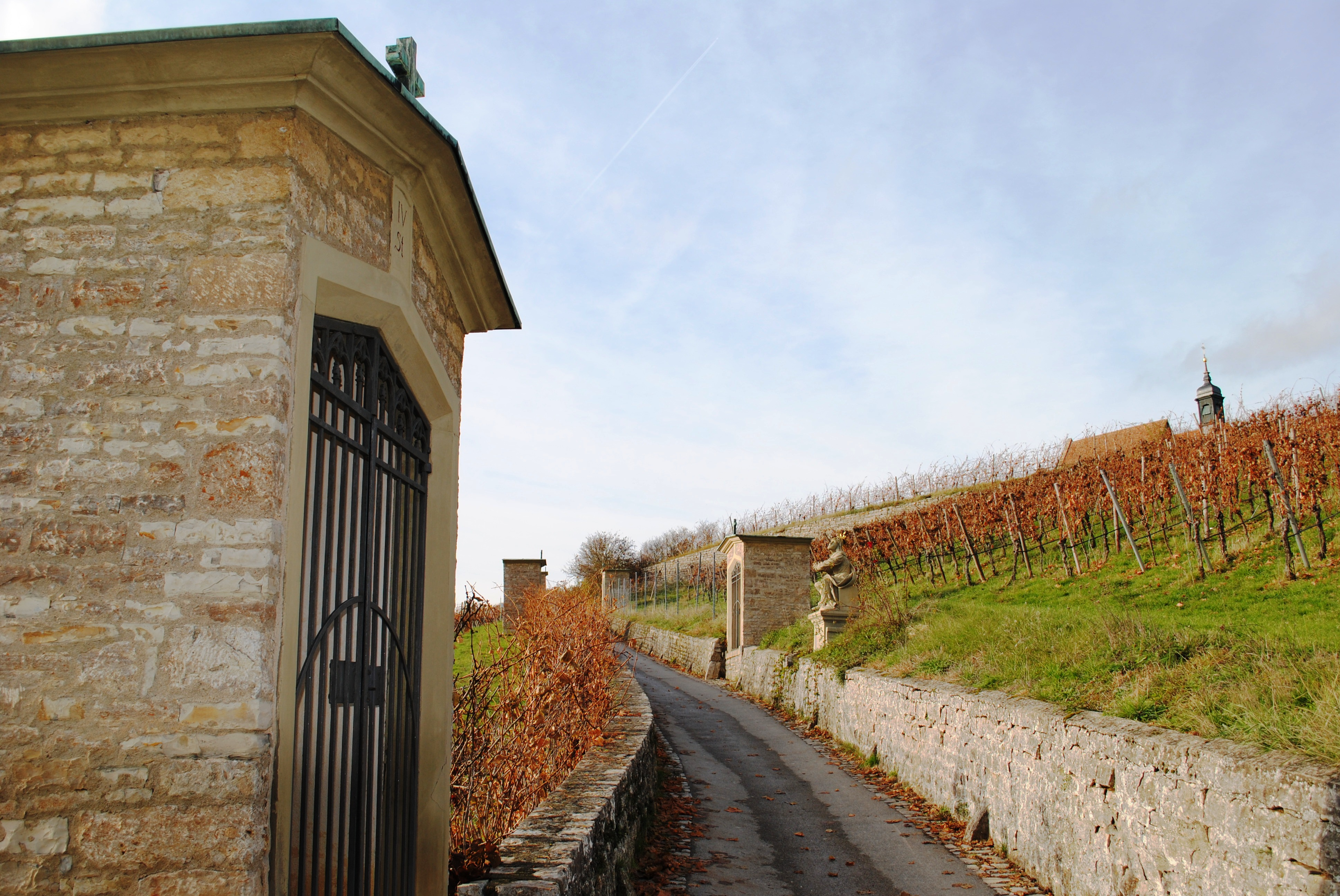 Kreuzweg, Kirchberg, Volkach, 14 Stationen in Form von Bruchsteinkapellchen mit Reliefs, 1864; D-6-75-174-146